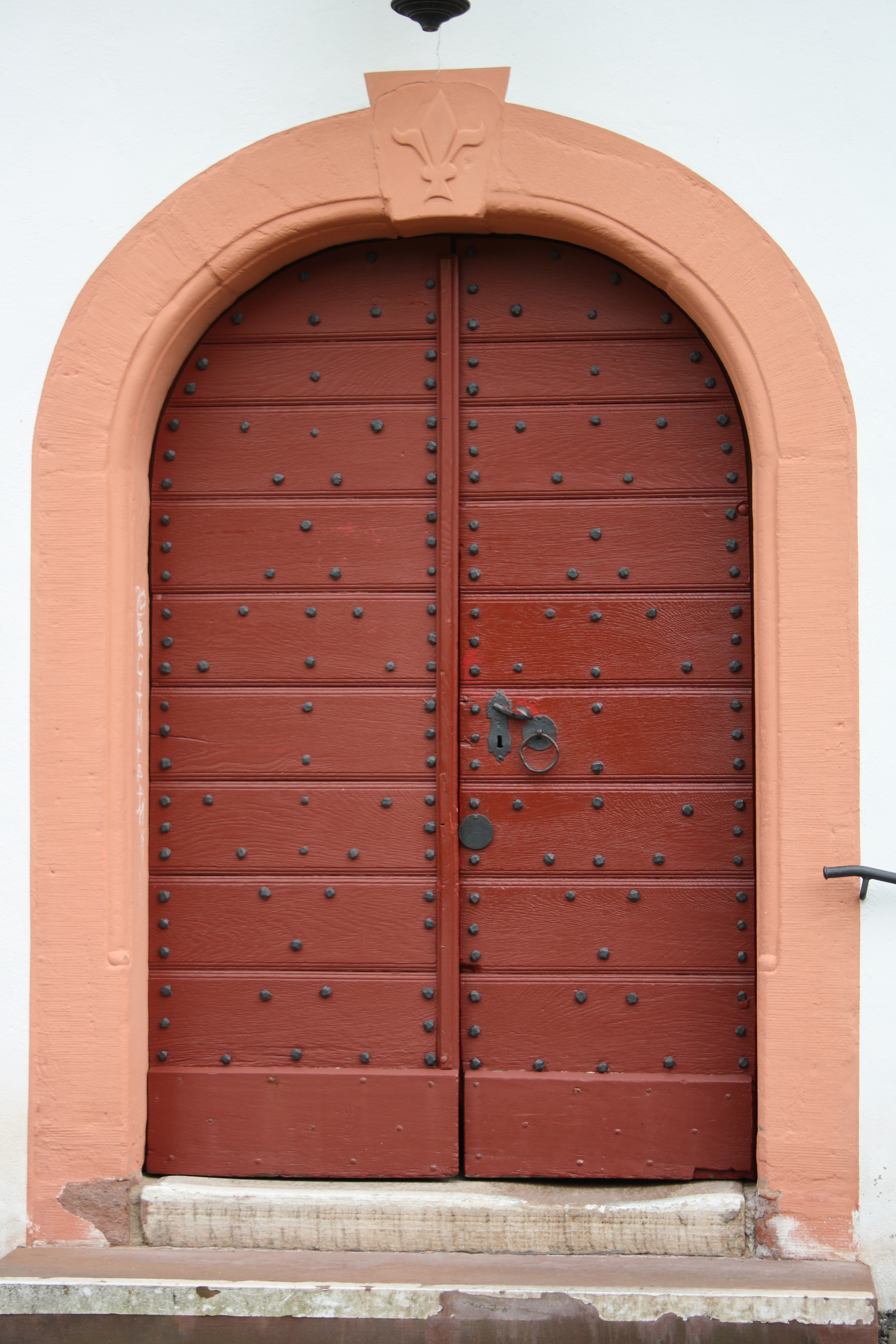 Portal der katholischen Pfarrkirche Heilig-Kreuz in Kreuzweingarten